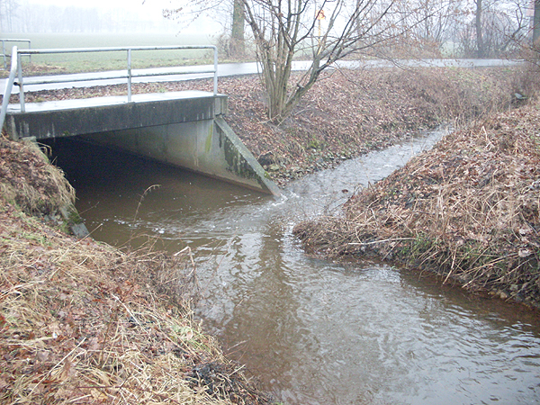 Hövelhof: Mündung des Holtebaches in den Schwarzwasserbach